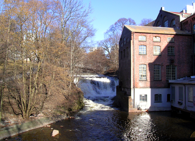 Øvre Foss waterfall, Akerselva, Oslo.